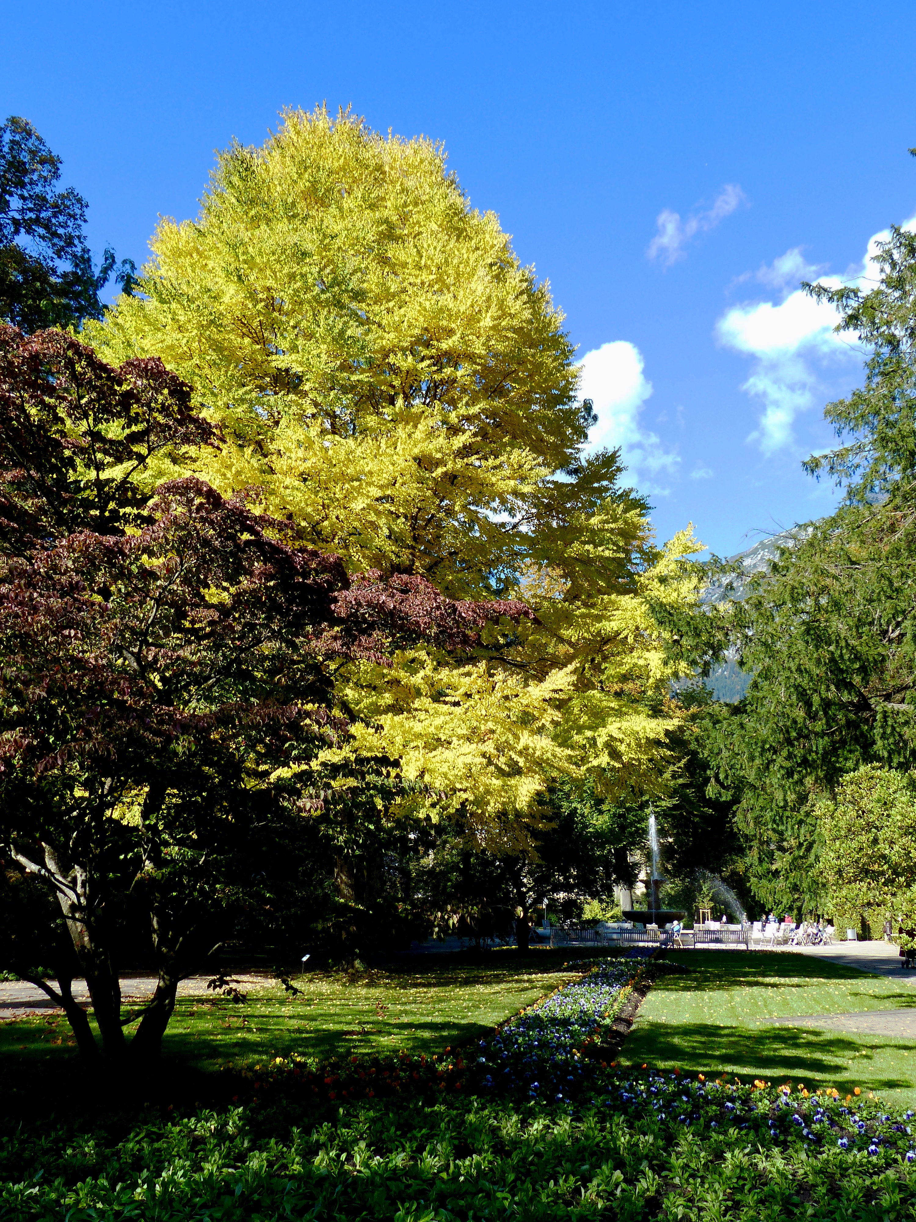 Kurpark Bad Reichenhall im Oktober 2016 Asiatischer Blumenhartriegel (Vordergrund) und Judasblattbaum (Hintergrund)